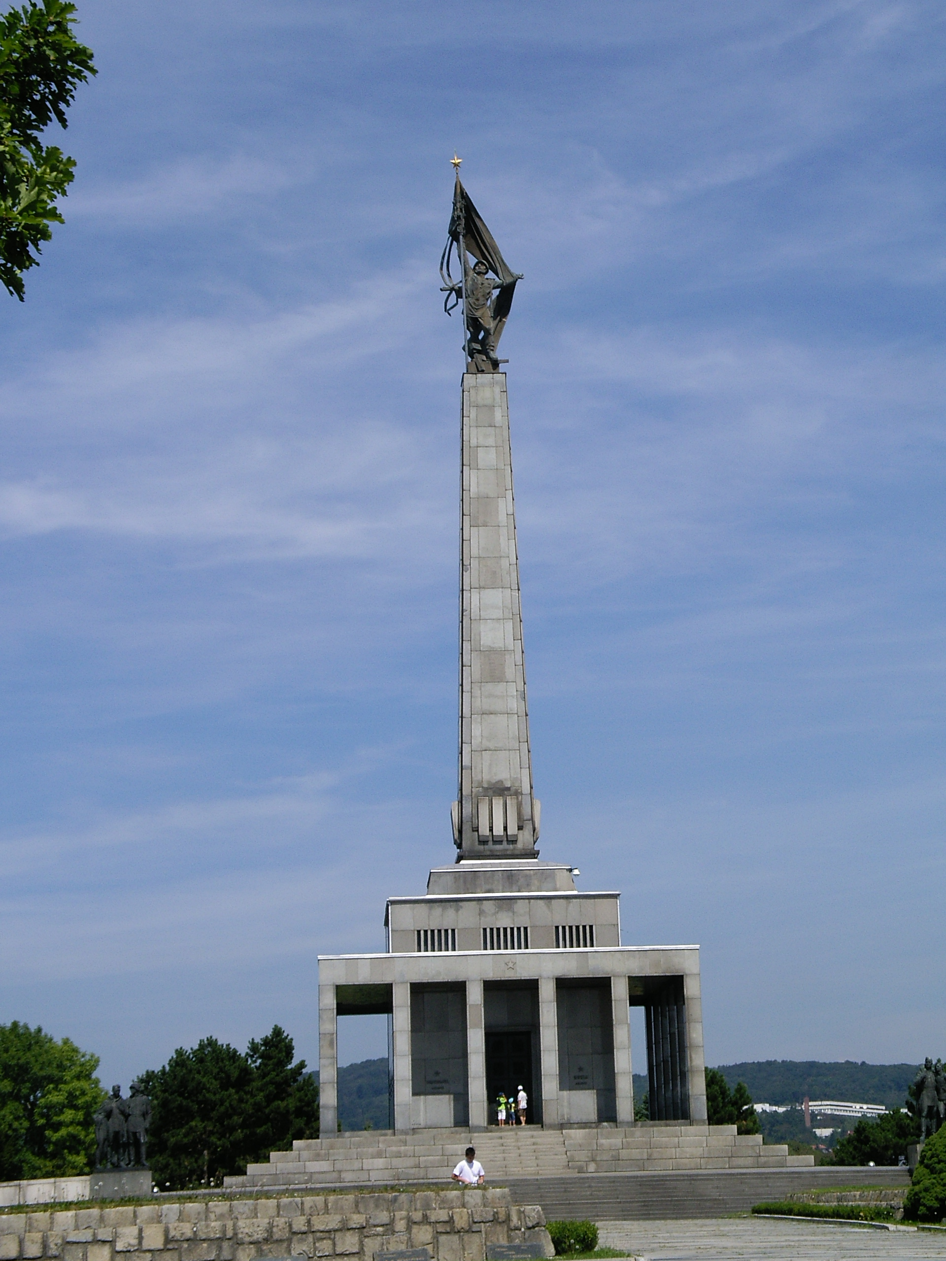 Perkele, Italia, foto scattata dal sottoscritto